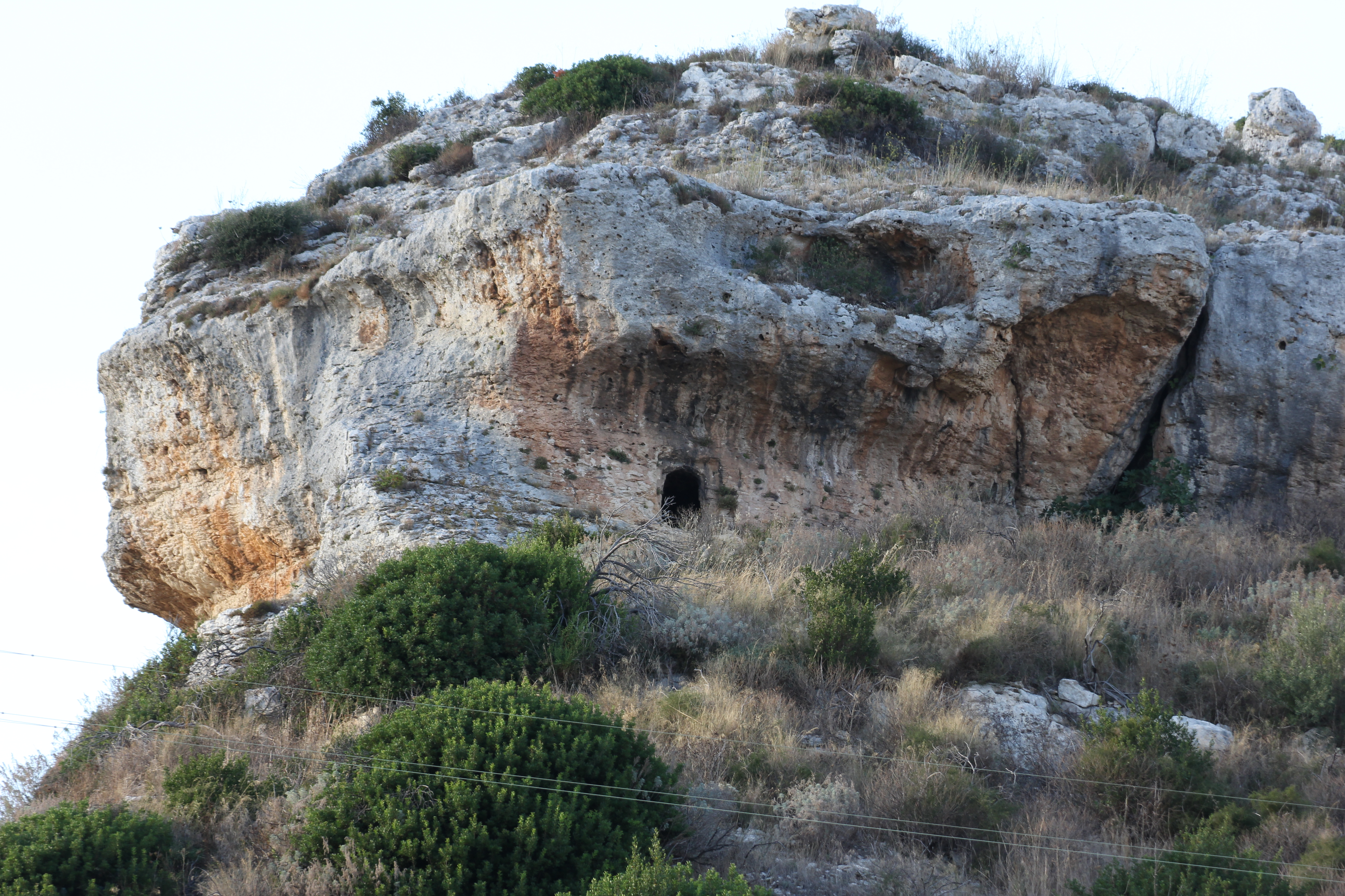 Florinas - Necropoli di Pedras Serradas